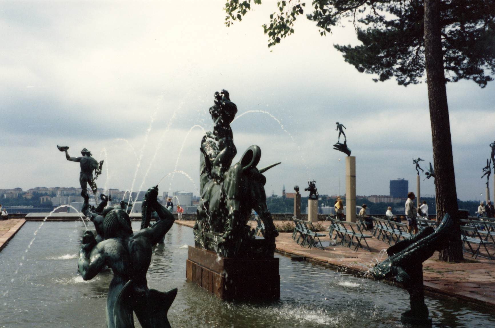 Skulpturparken på Millesgården på Lidingö